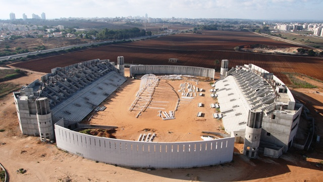 צילום אויר של אצטדיון נתניה. אצטדיון נתניה בבניה, יוני 2009